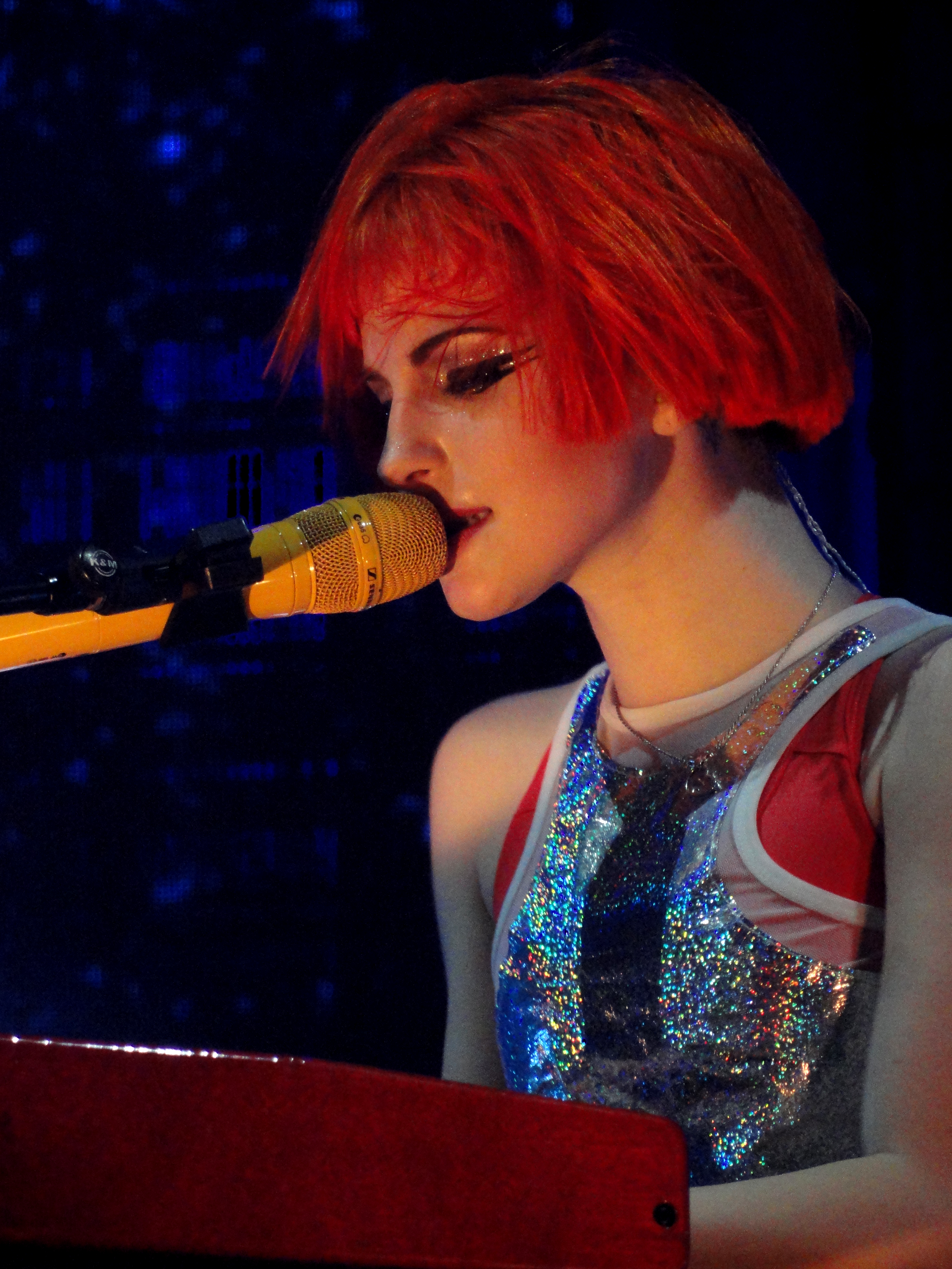 Paramore en vivo el 15 de octubre de 2013 en Seattle, Washington, EUA. En la imagen: Hayley Williams.